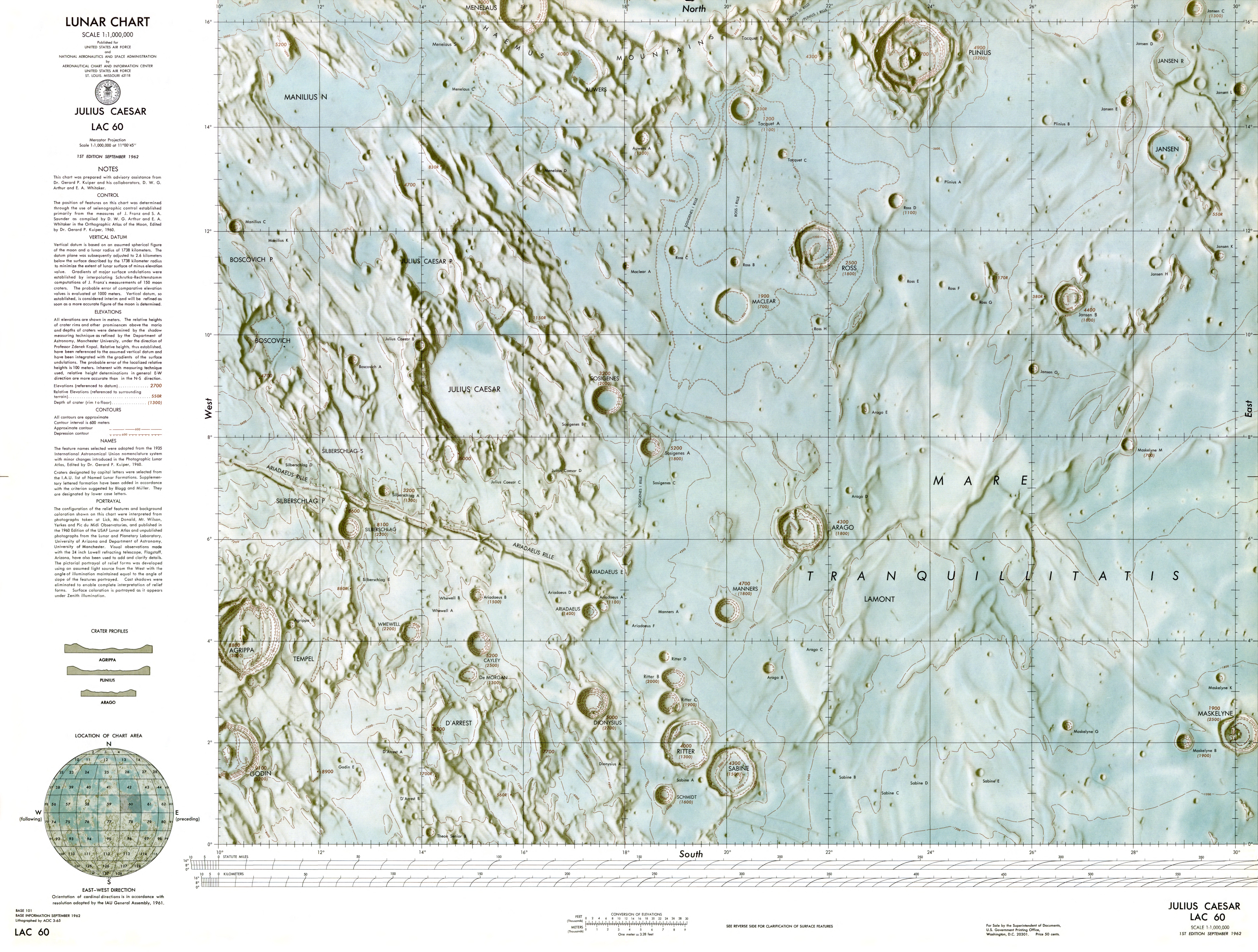 1:000 000 scale lunar chart - Julius Caesar (LAC 60)